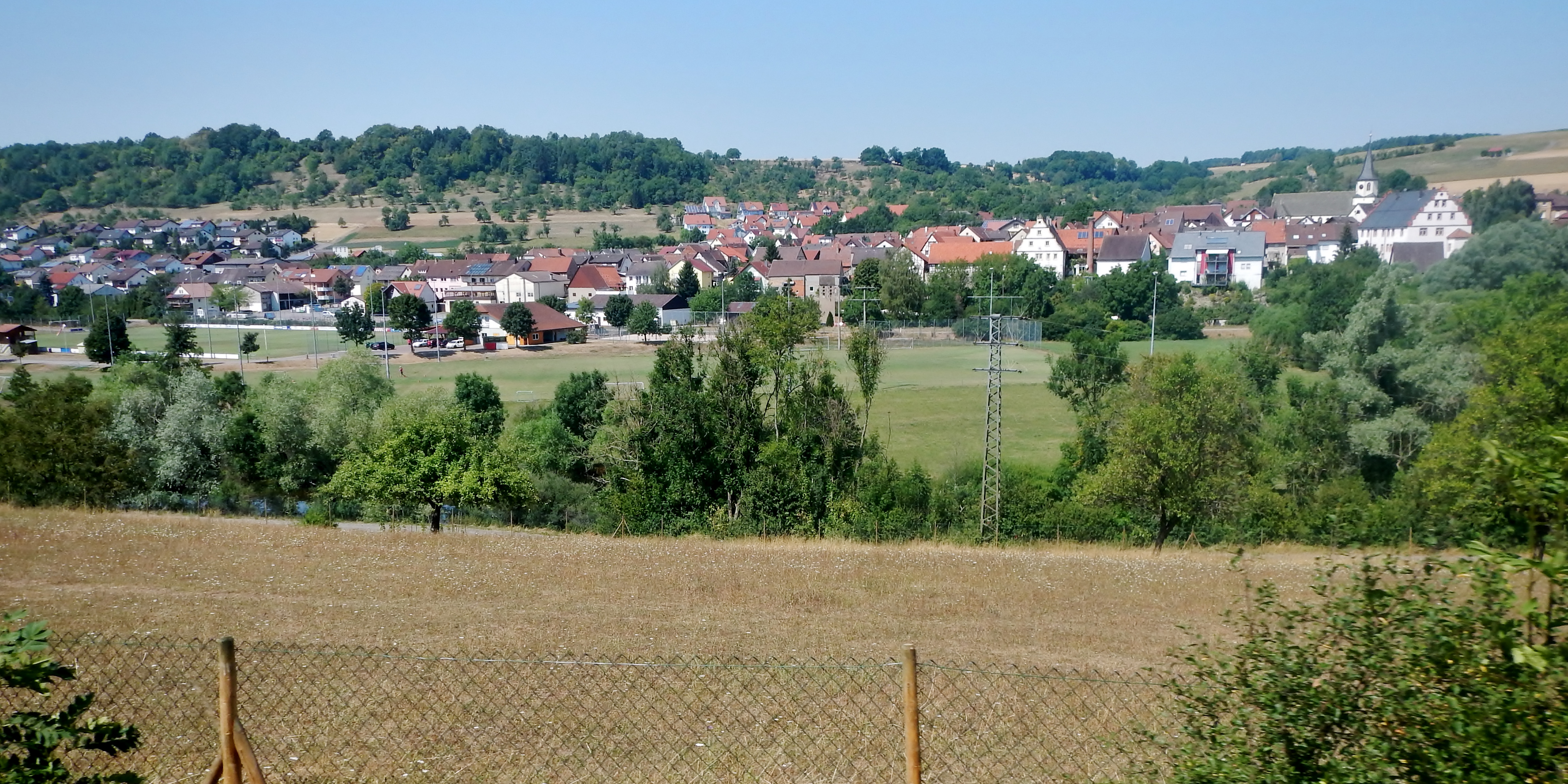 Gommersdorf